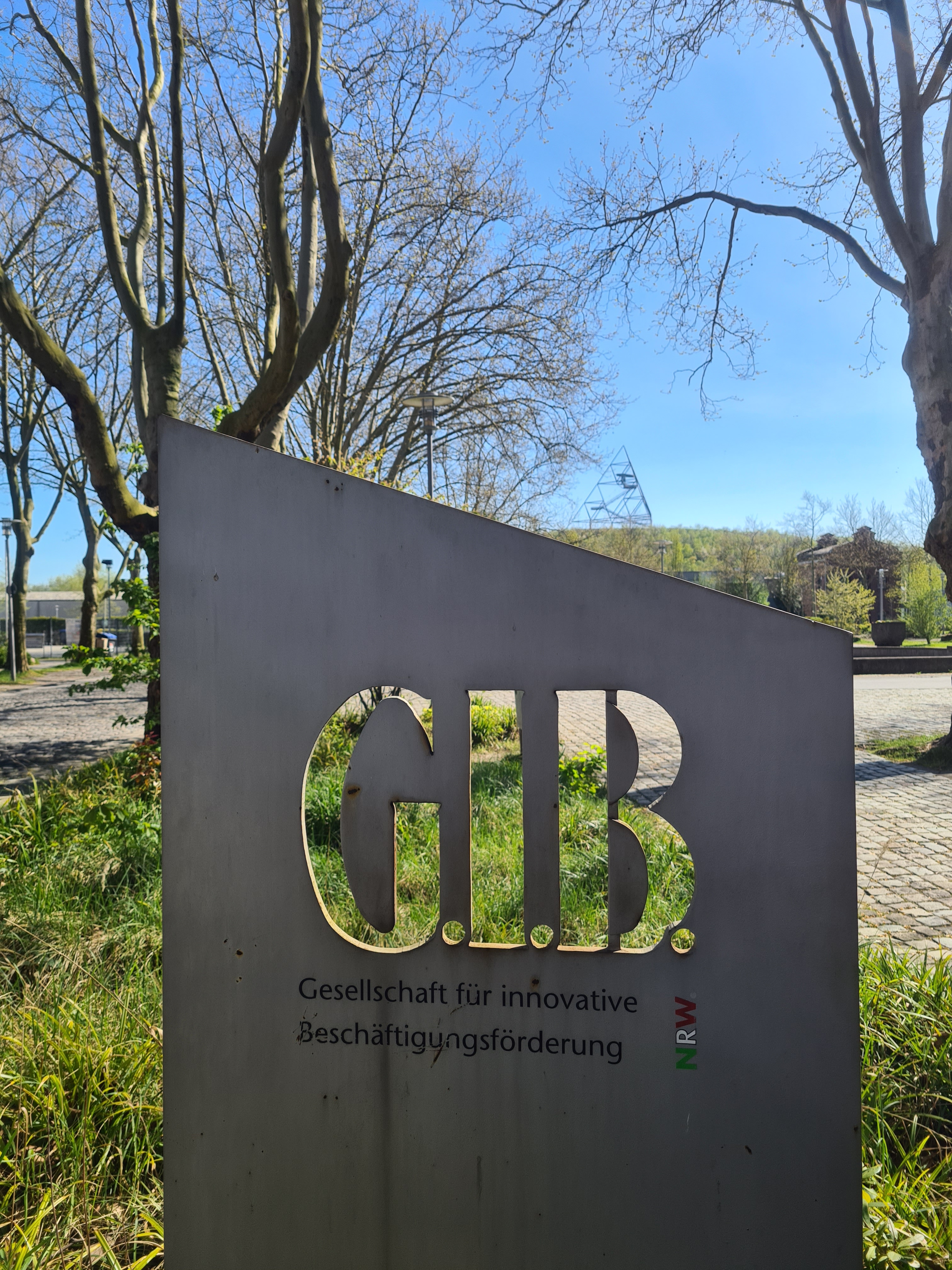 Der Sitz der G.I.B. NRW in der Zeche Arenberg-Fortsetzung. Im Hintergrund direkt zu sehen der Tetraeder.